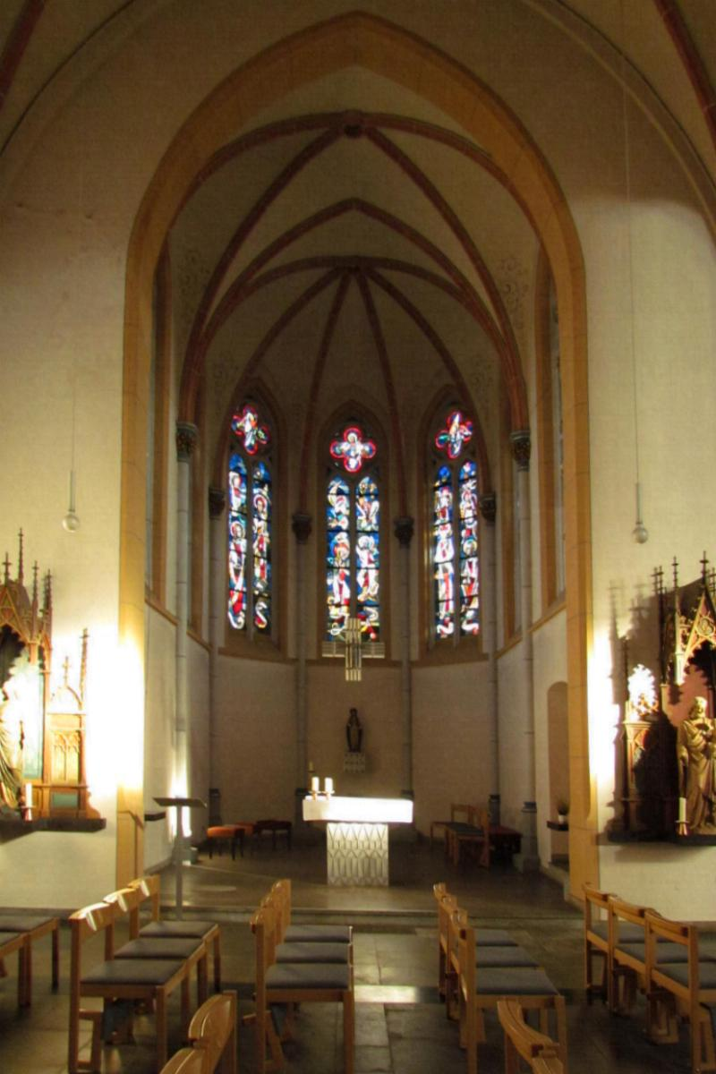 St. Lambertus Hückelhoven